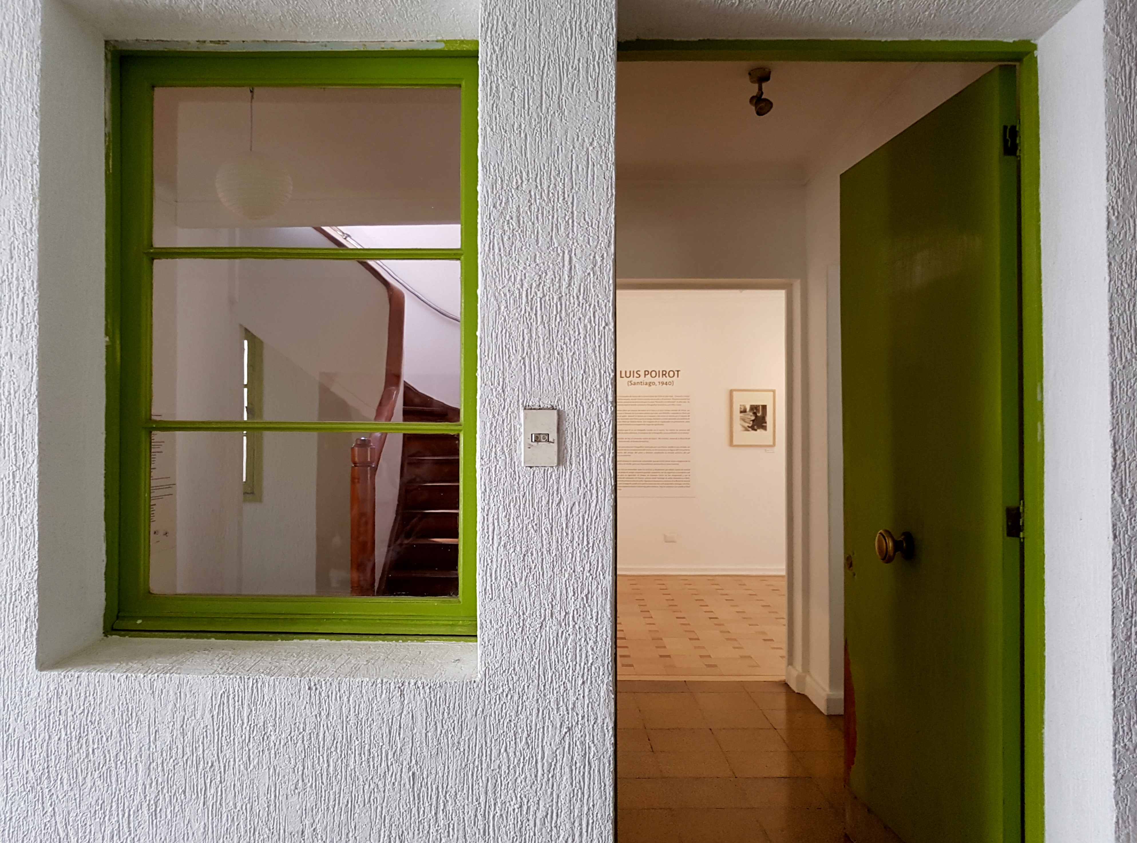 Sede de la Fundación Víctor Jara, calle Almirante Riveros 067, entre las avenidas Bustamante y Vicuña Mackenna; comuna de Providencia, Santiago de Chile.